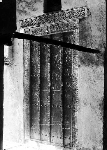 Vue de la mosquée Sidi-Okba, Algérie. Photographie de Séraphin-Médéric Mieusement.